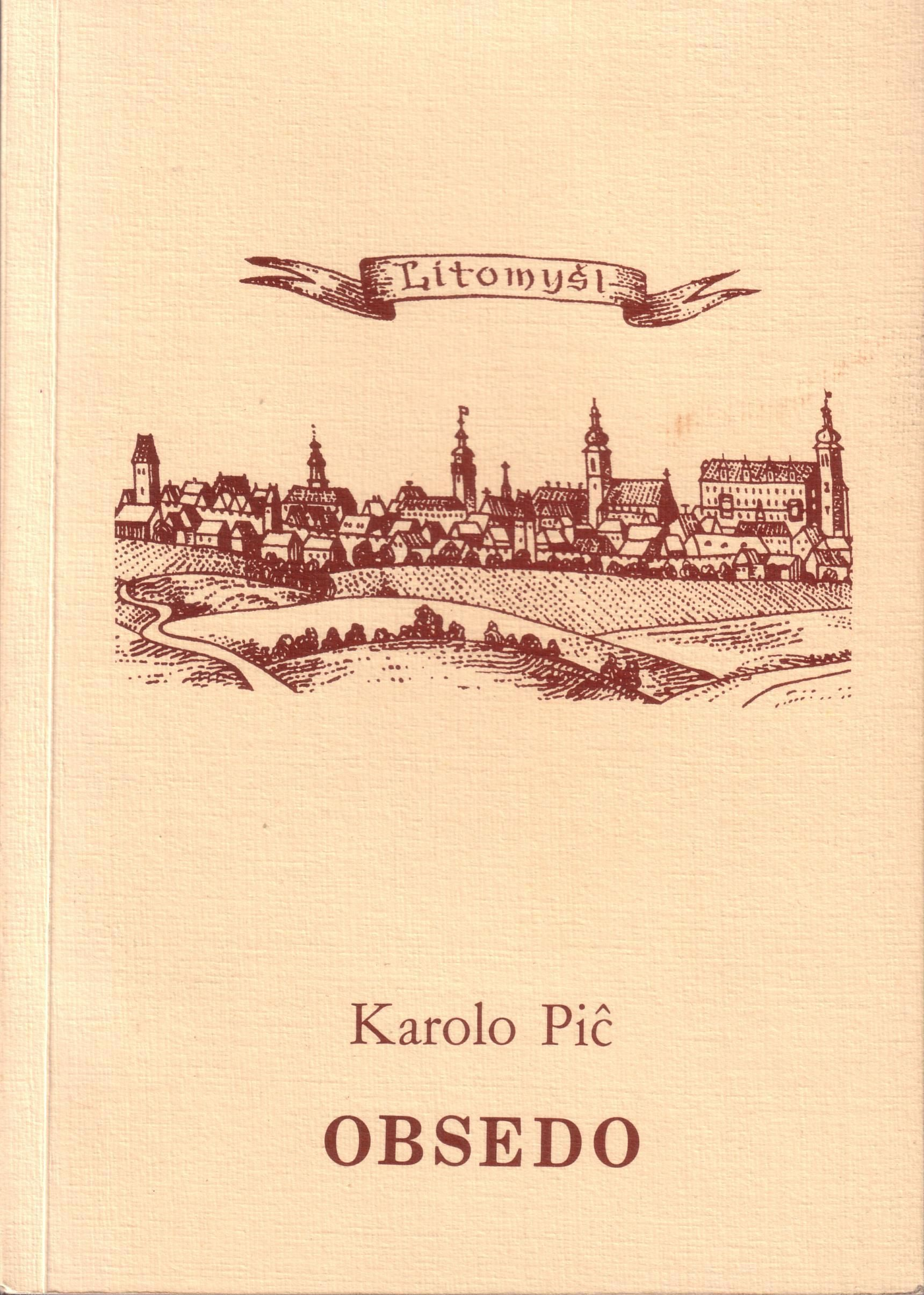 kovrilpagxo